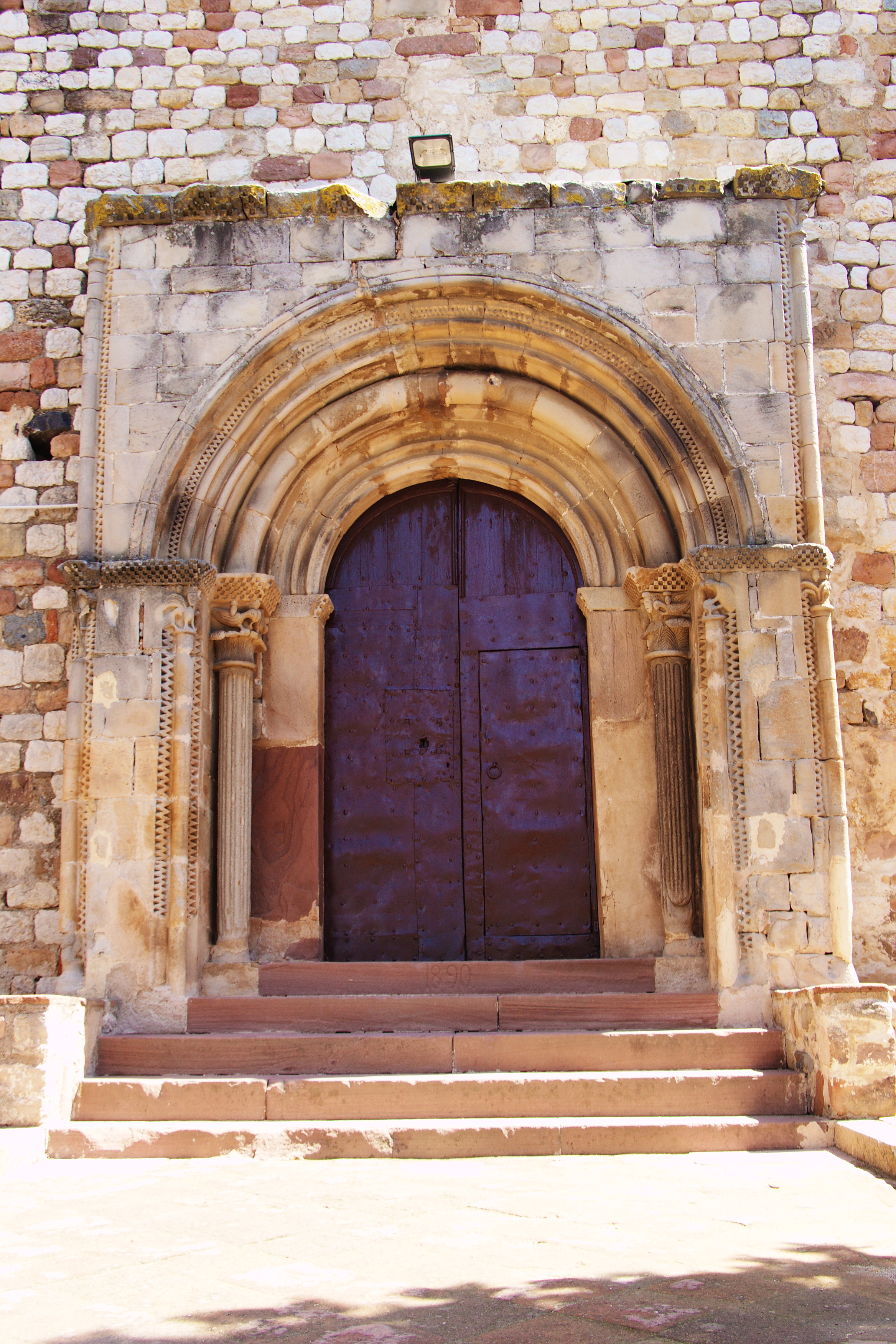 Església parroquial de Sant Feliu (Canovelles) Object location41° 40′ 13″ N, 2° 19′ 43.66″ E